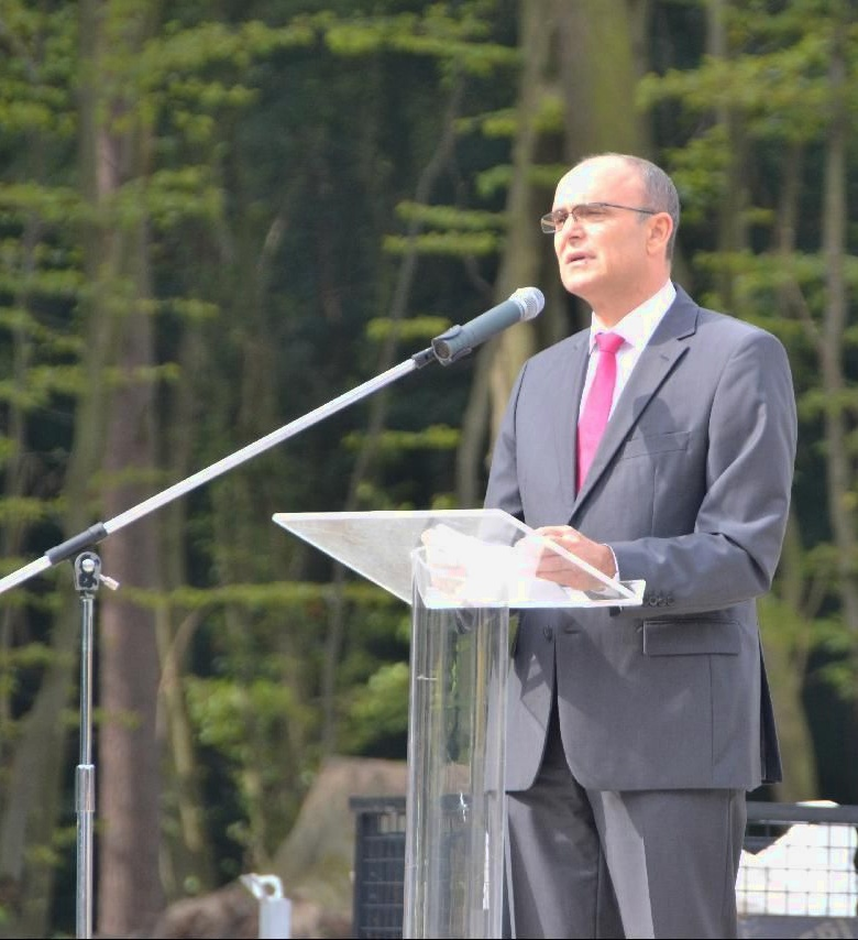 Erwin Sellering im Zoologischen Garten Rostock